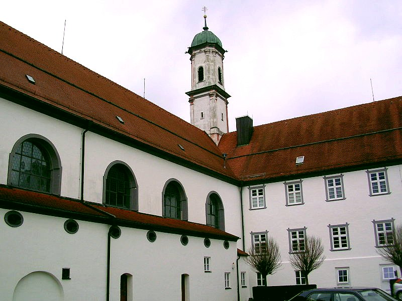 Die Klosterkirche der Dominikanerinnen in Bad Wörishofen, vom Klosterhof aus gesehen.